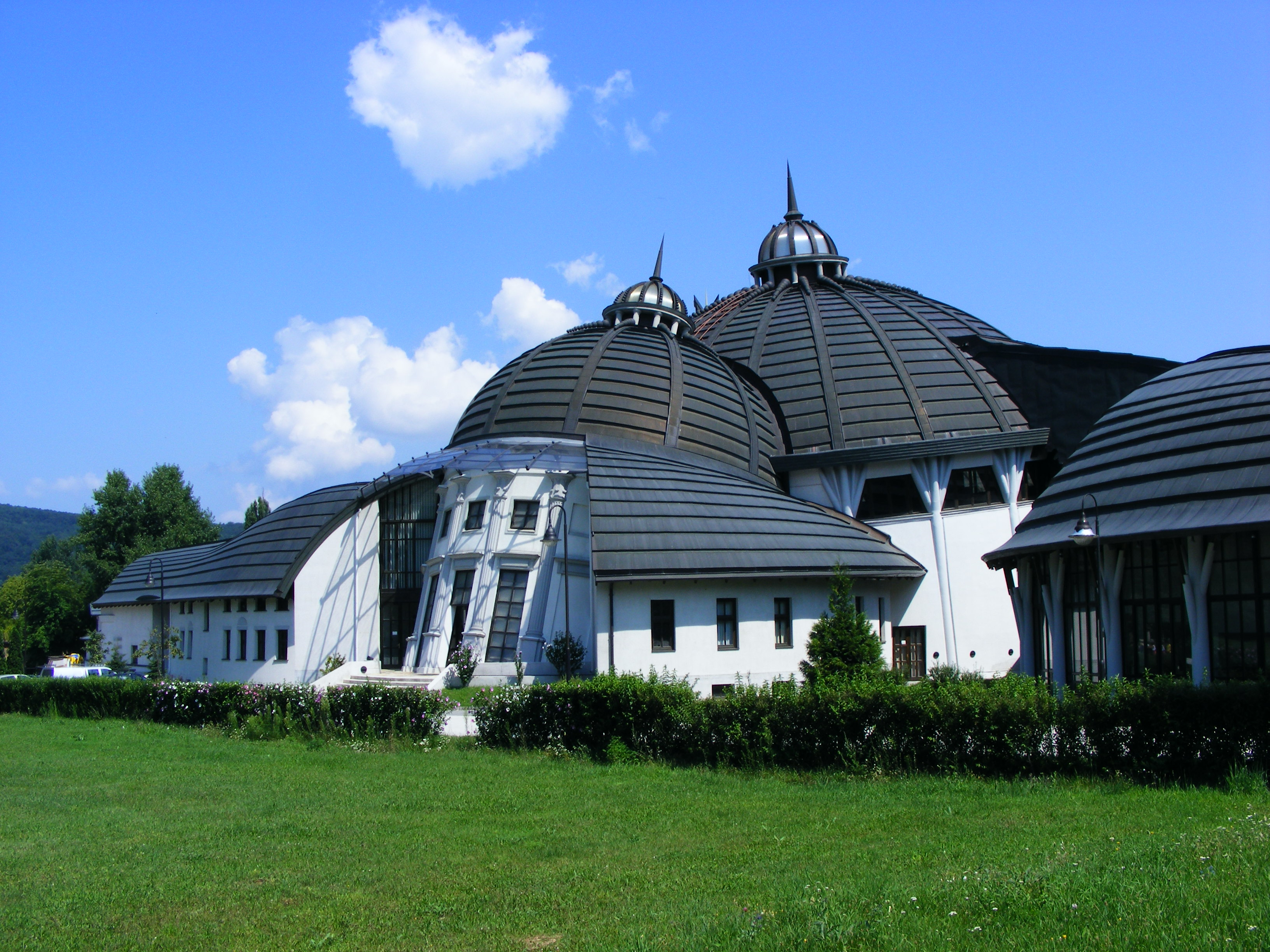 Stephaneum déli oldala